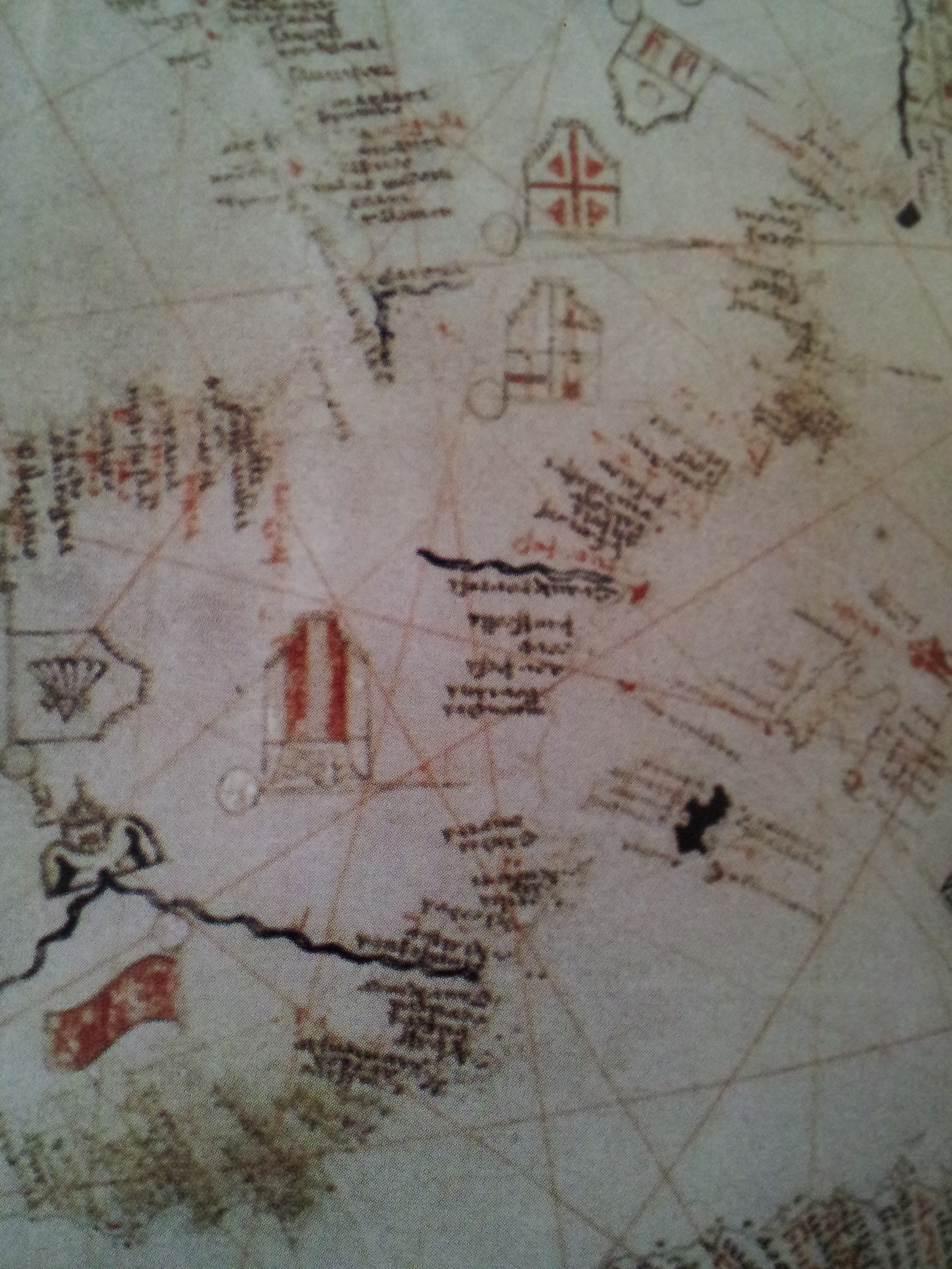 Detall del Mapa de Macià de Viladestes o Viladesters de 1423, on es veu la senyera coronada valenciana